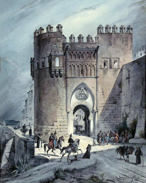 Spanisches Stadttor (Segovia?) mit reicher Personenstaffage. Aquarell und Papier, signiert, datiert: (18)34; 34.5 x 28 cm